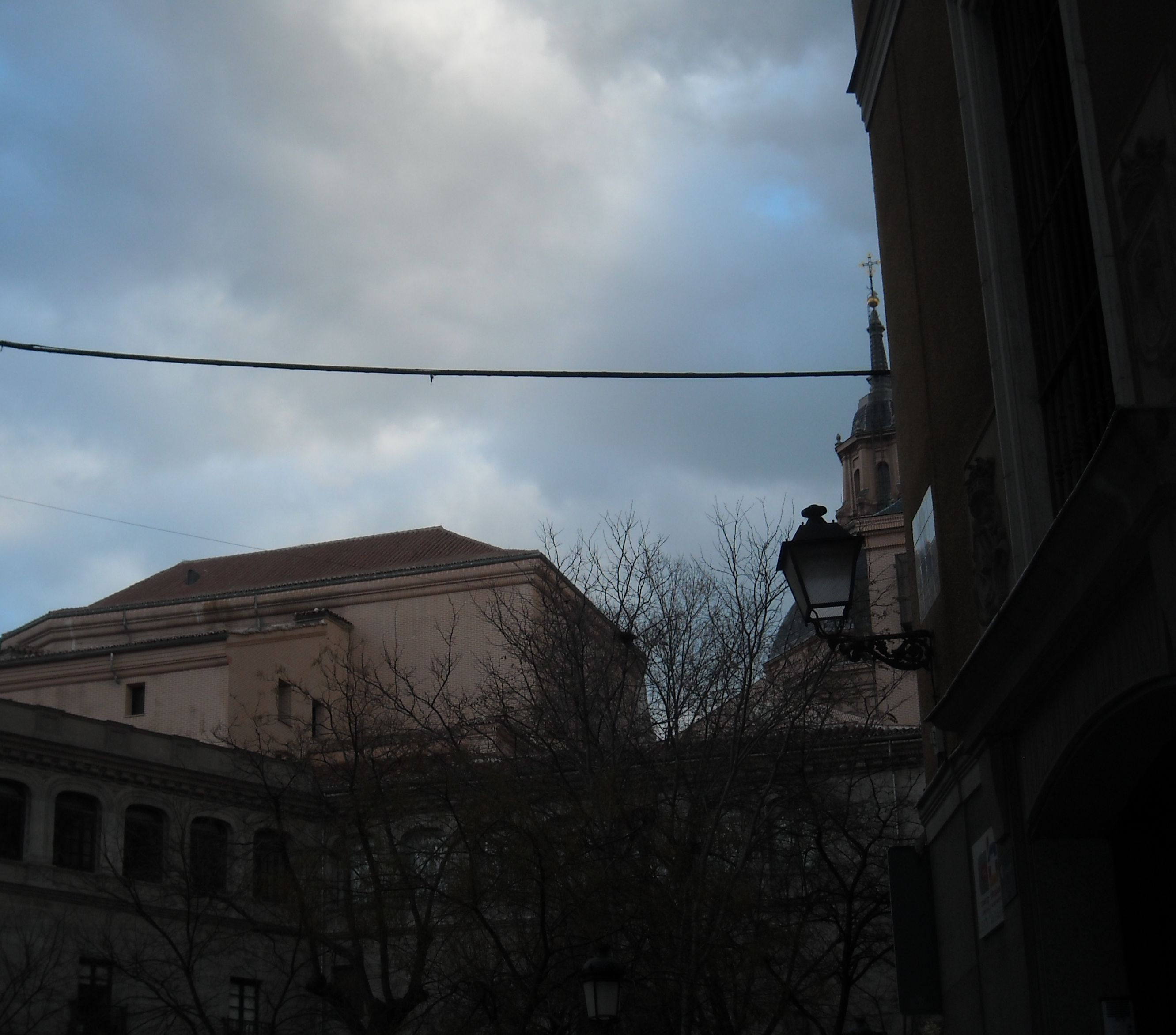 Entrada por la calle Alfonso VI al Colegio de San Ildefonso de Madrid, bajo la Plaza de la Paja